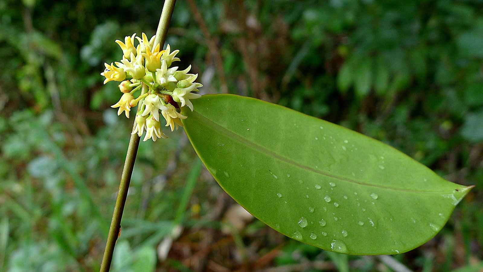 Peplonia bradeana (Fontella & E.A.Schwarz) Fontella & Rapini